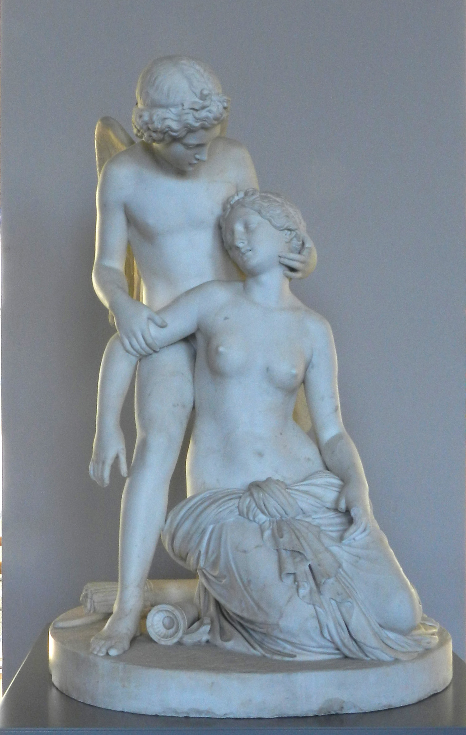 Die Amor und Psyche Gruppe ist aus dem Nachlass des Bildhauers Heinrich Kümmel nach Hannover gekommen. Kümmel hat für das Thema eine ganz eigene Bildsprache gefunden. Dargestellt ist der Moment, in dem Psyche nach dem Öffnen der Dose, in der sie eine Schönheitssalbe vermutet, wie tot herniedersinkt. Amor kommt herbei und rettet sie. Die Gruppe befindet sich heute im Landesmuseum Hannover.